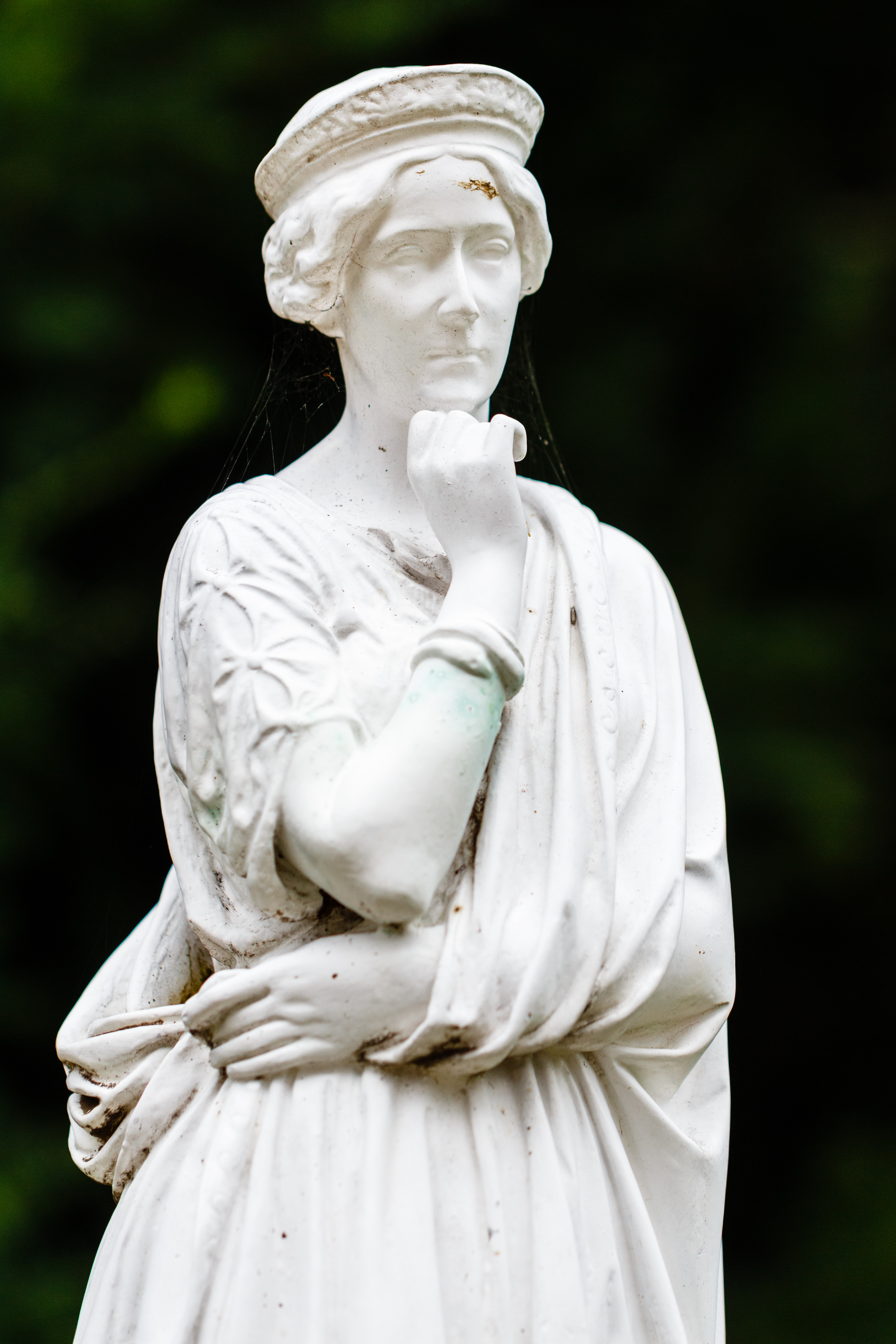 Rachel-Félix-Statue auf der Pfaueninsel